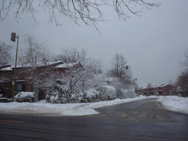 Ile-des-Soeurs Paisaje invernal